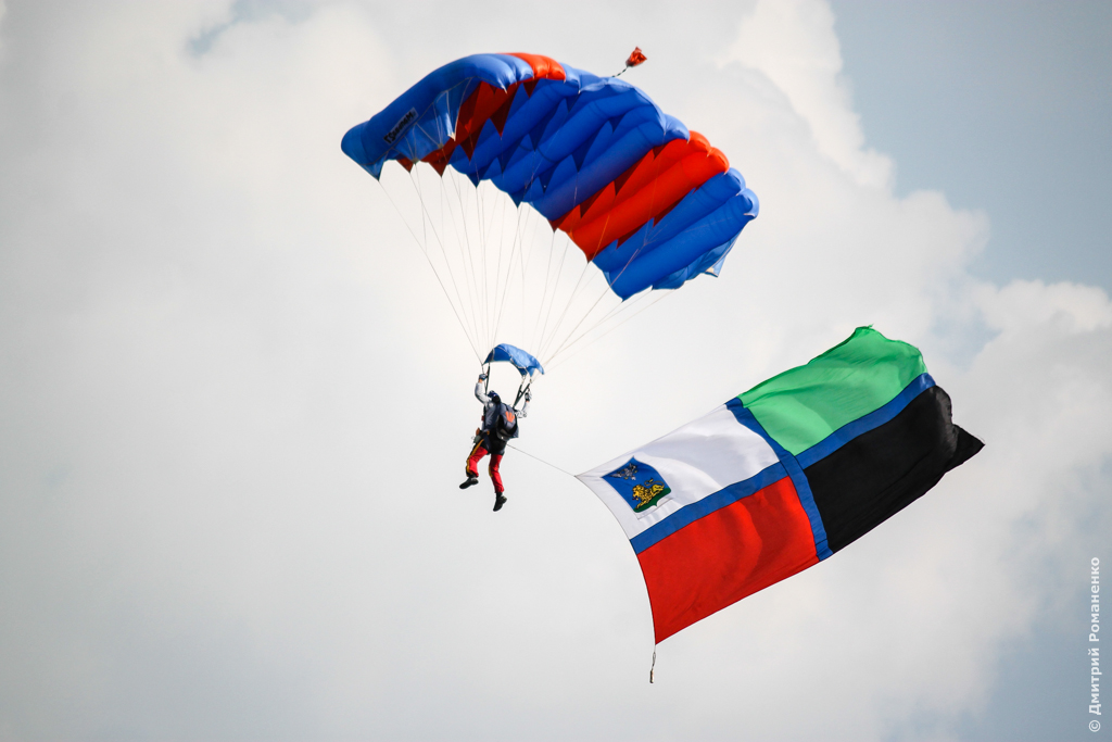 Фестиваль «Небосвод Белогорья» 2014 в Прохоровском районе Белгородской области. 2 августа 2014 года.